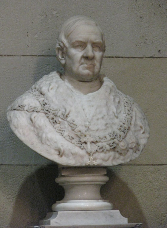 Bista Jurja Haulika u Zagrebačkoj katedrali